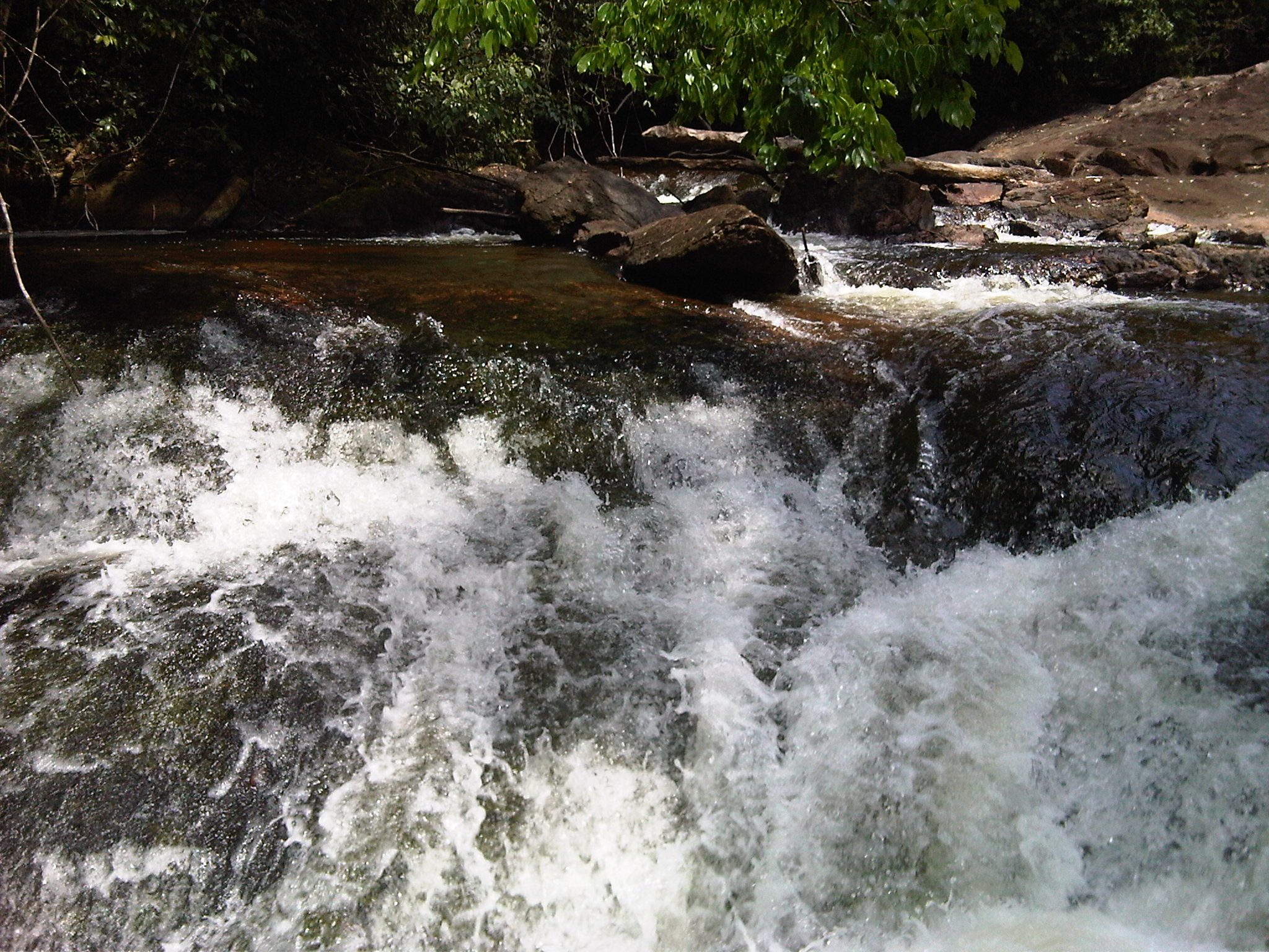 A St-Laurent du Maroni